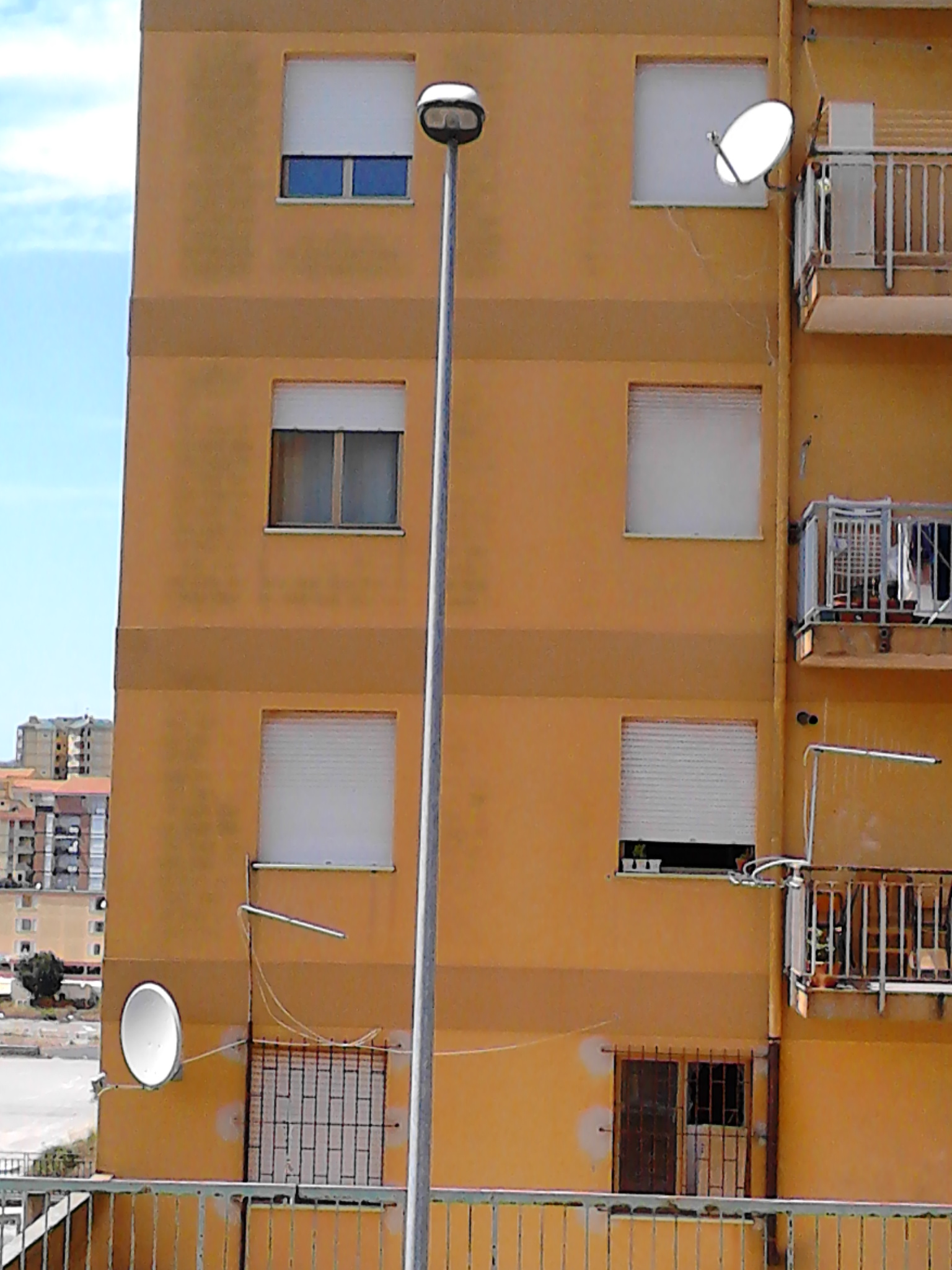 Lampione stradale per l'illuminazione pubblica a Nuoro in via Togliatti con il vecchio portalampada utilizzato fino al 2019